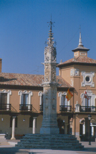 Rollo jurisdicional - Villalón de Campos (Valladolid) - Diapositiva 48 x 48 Color